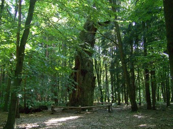 drzewo pomnikowe - dąb szypułkowy, 1 km na zachód od wsi Mostki gm. Lubrza woj. Lubuskie